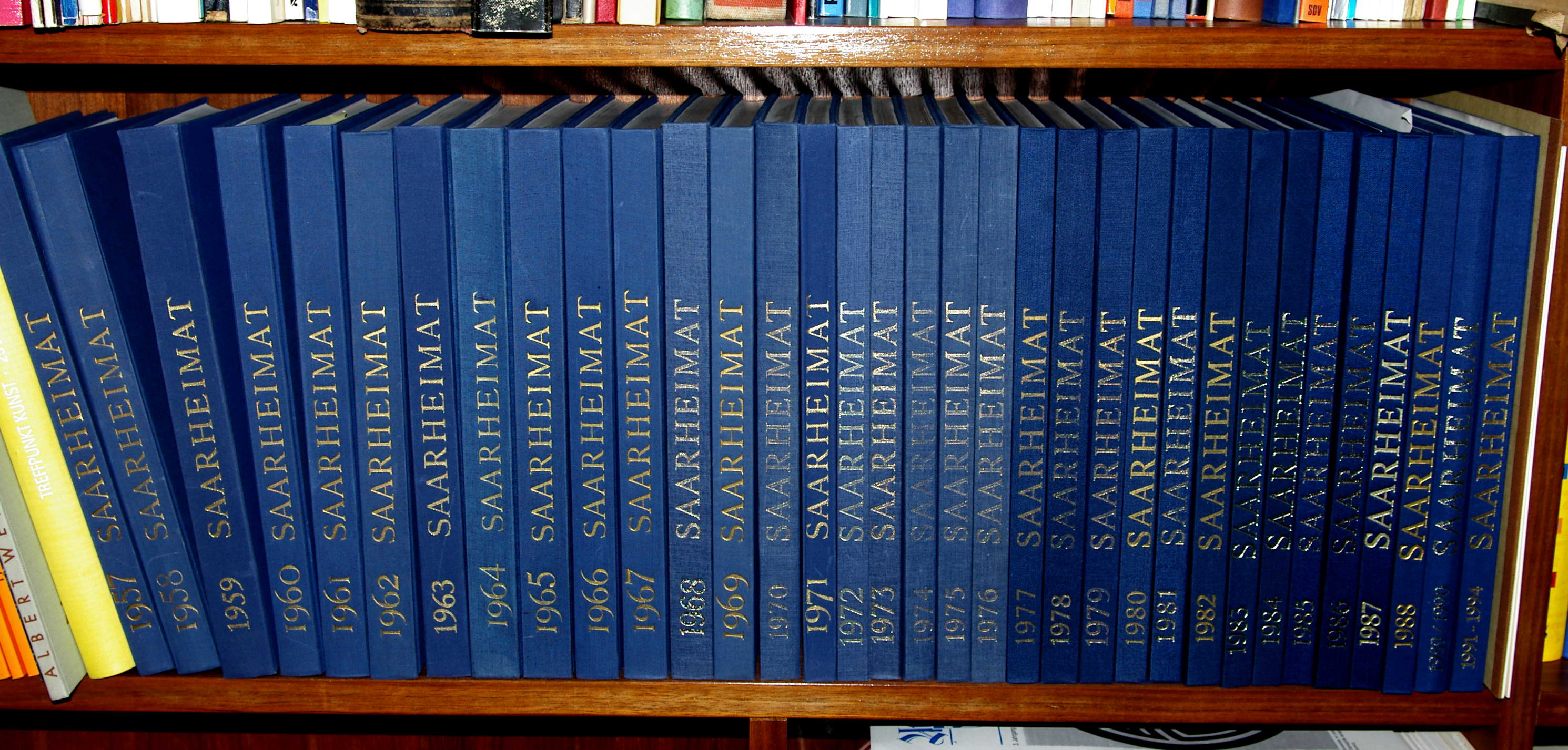 Komplettausgabe der Zeitschrift SAARHEIMAT